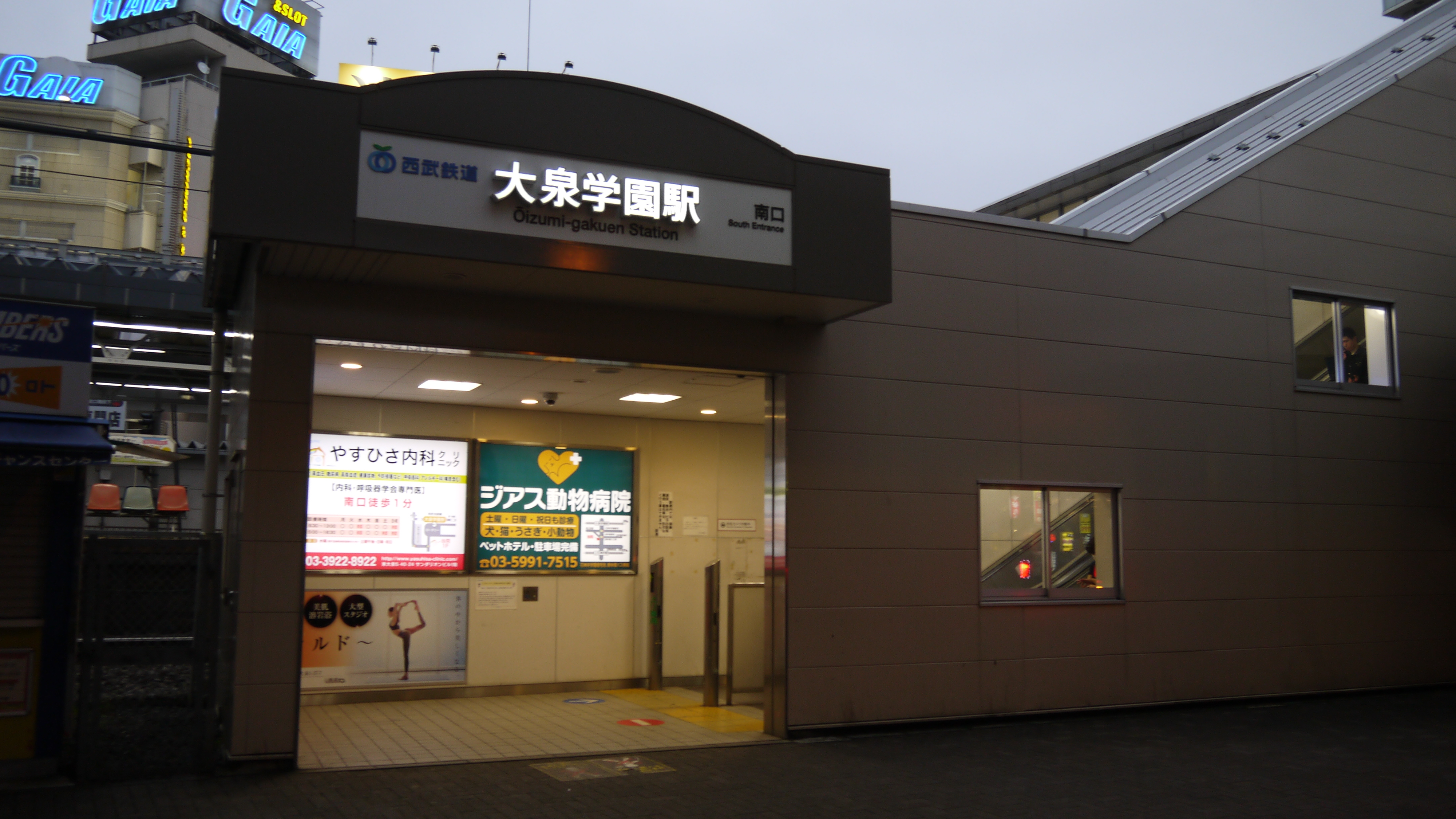 大泉学園駅南口 Panasonic Lumix DMC-GF3